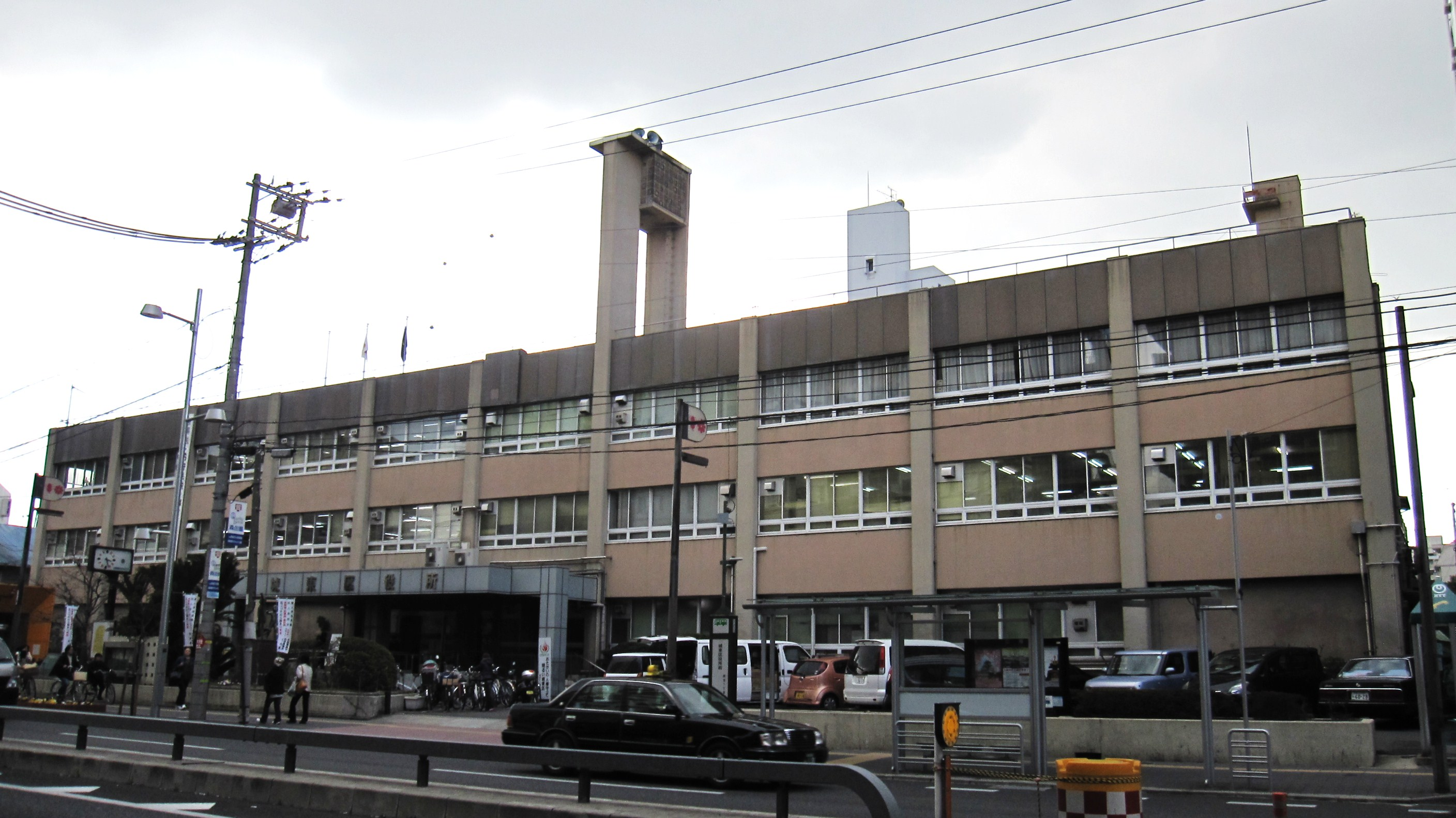 城東区役所